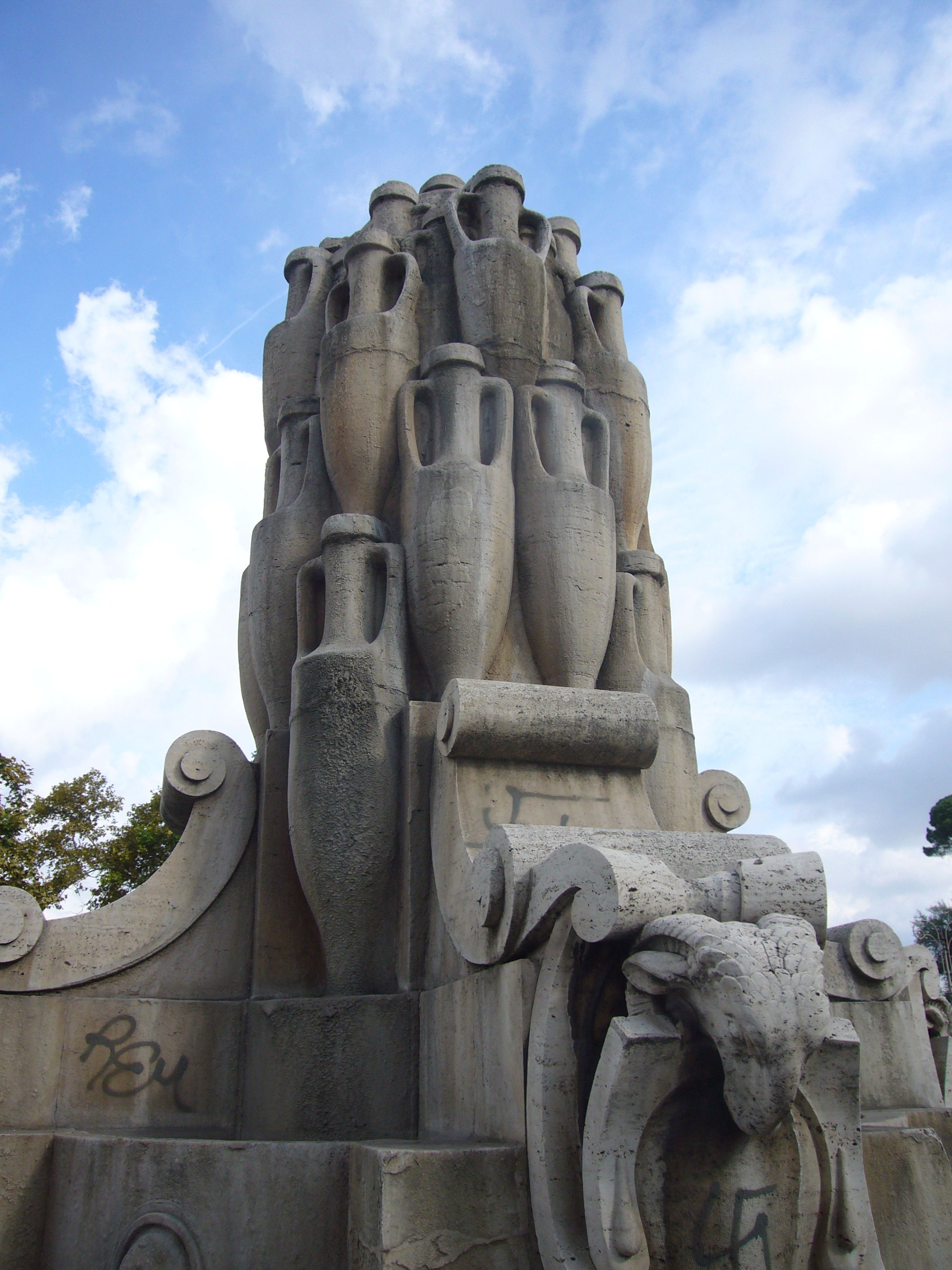 Roma, piazza dell'Emporio - fontana delle anfore